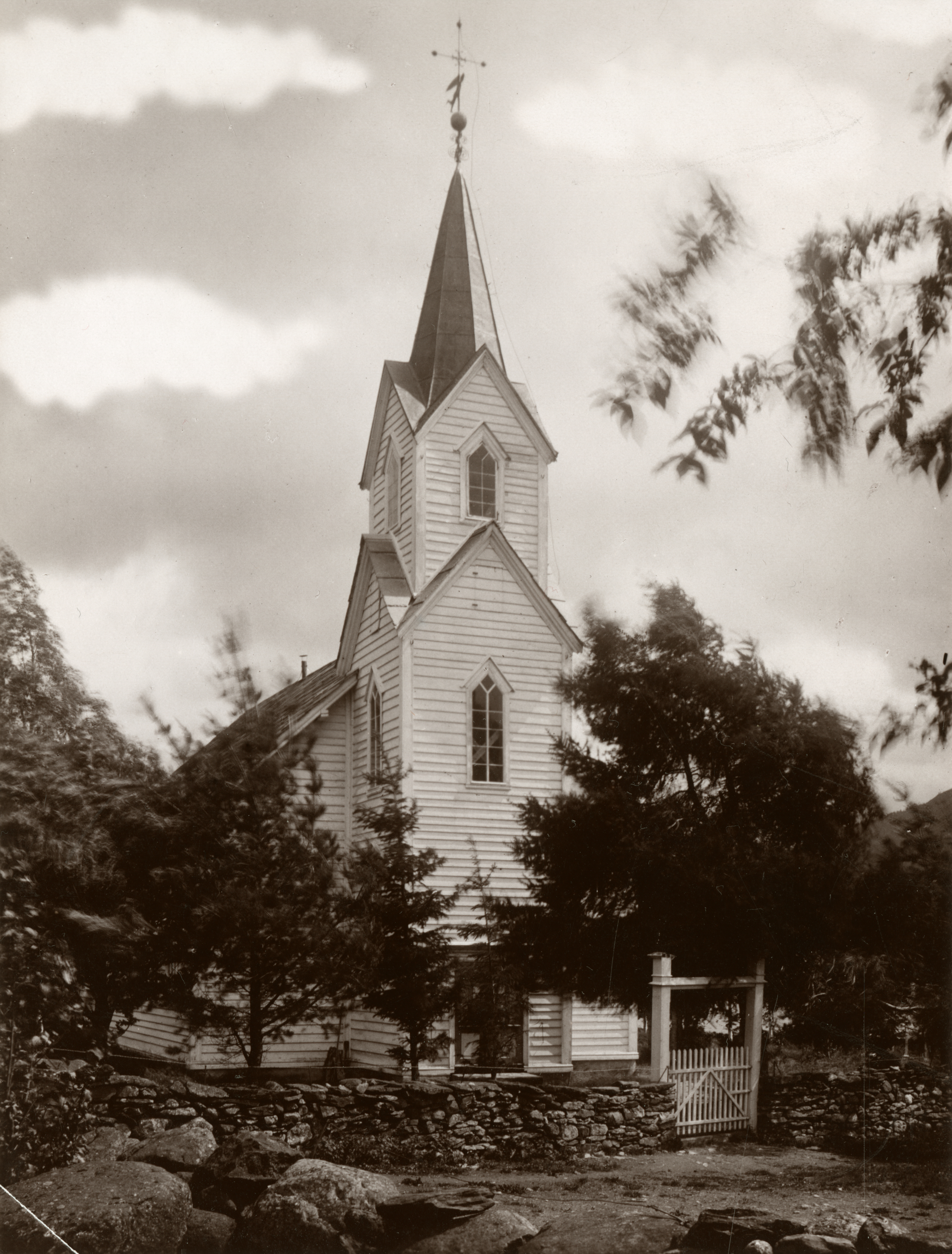 Hafslo kirke i Fet, Sogn og Fjordane